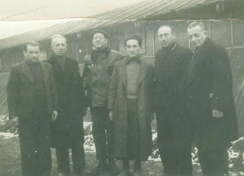 מחנה המעצר גירס, 1941, ינואר